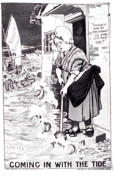 Emily J. Harding Andrews Mrs Partington Coming in with the Tide. Artists' Suffrage League ohne DatumThe English anecdotal character Mrs. Partington is said to have tried to mop up a tidal wave.